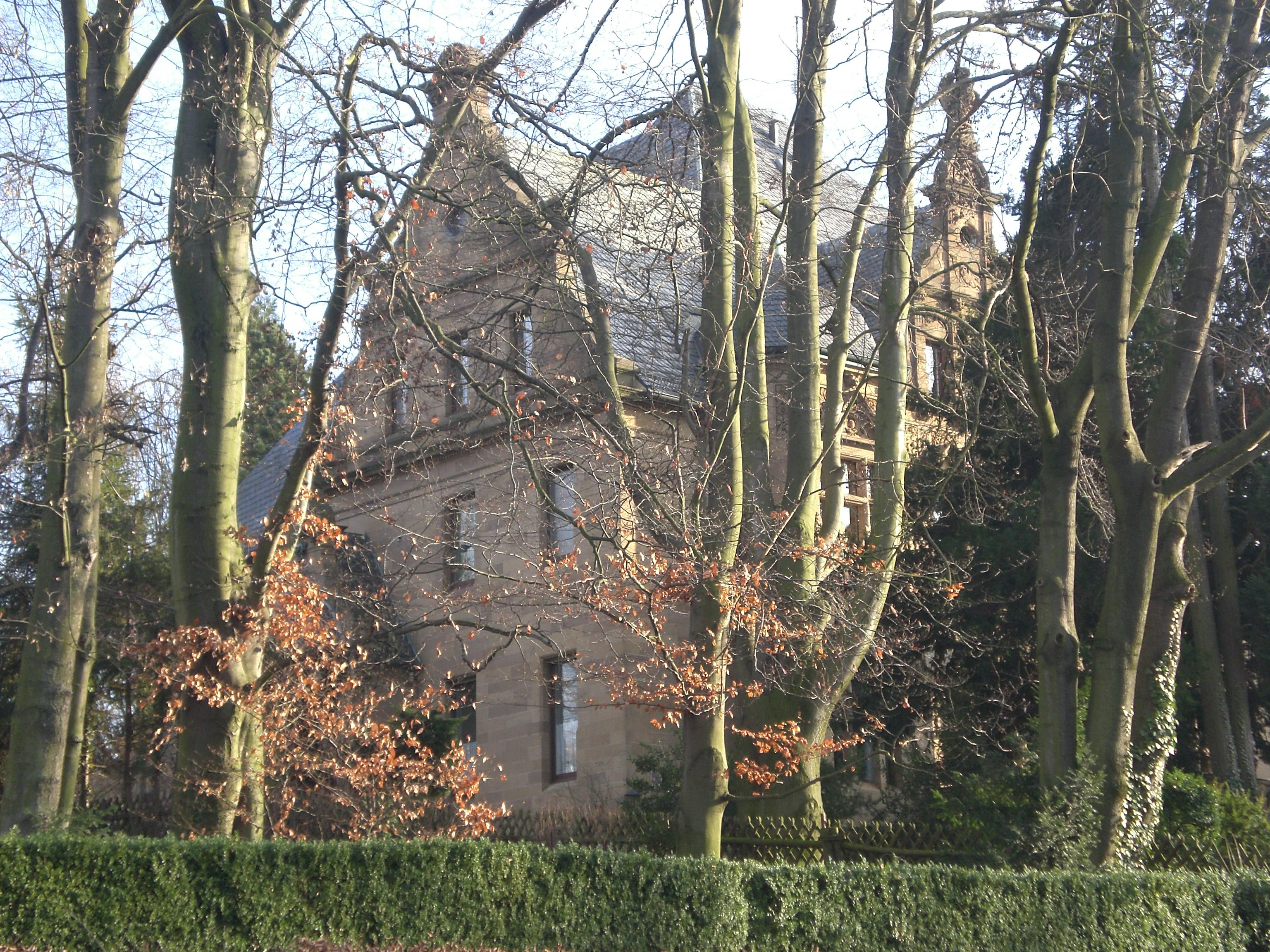 Villa Carl Knorr in der Gutenbergstr. 51 in Heilbronn